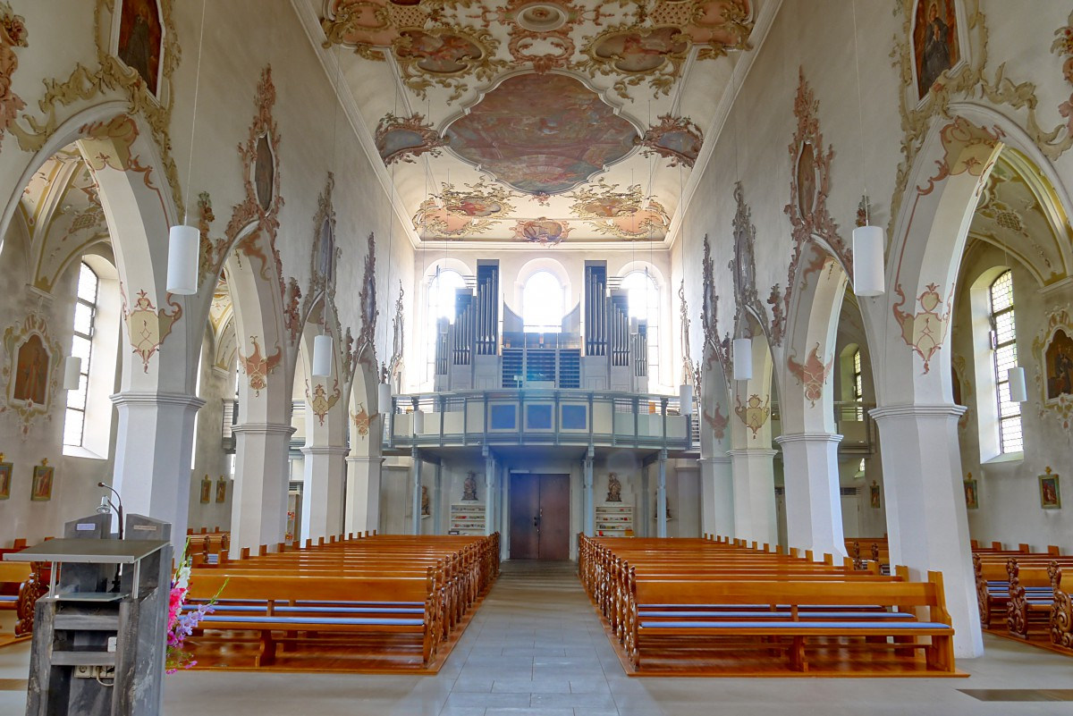 Orgel der Liebfrauenkirche in Mengen